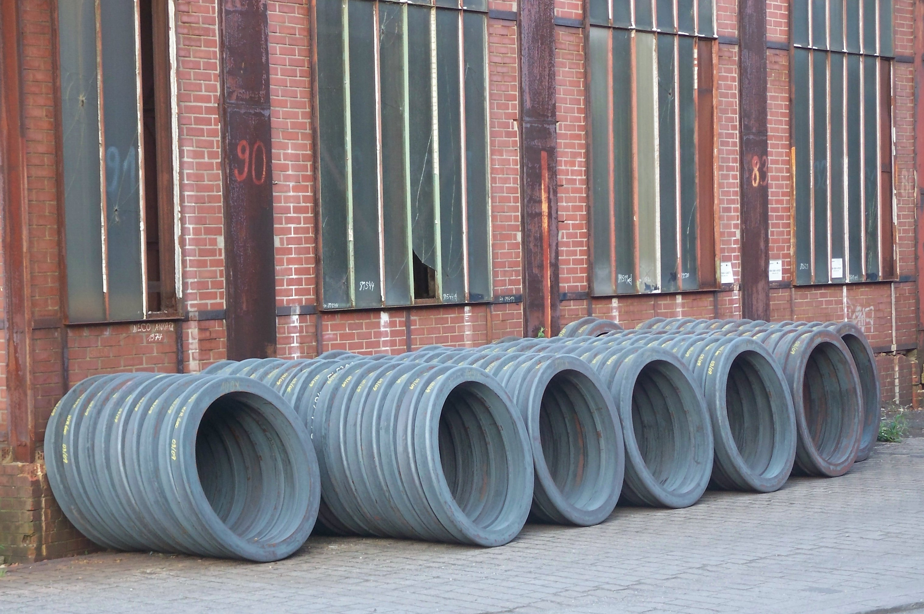 Rohlinge für Radreifen auf dem Werksgelände des Bochumer Vereins. Die Radreifen lehnen an einer Wand des Hallenkomplexes „Hammerwerk II“, einer der ältesten Gebäudeteile auf dem Gelände der Gußstahlfabrik.